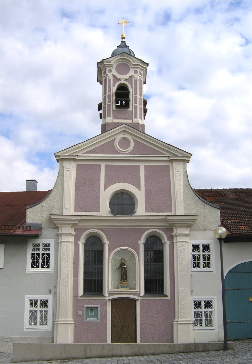 Am Roßacker 5; Kath. Kirche zu den Sieben Zufluchten (Roßacker-Kapelle), kleiner einheitlicher Spätbarockbau von Abraham Millauer, 1737, mit Ausstattung